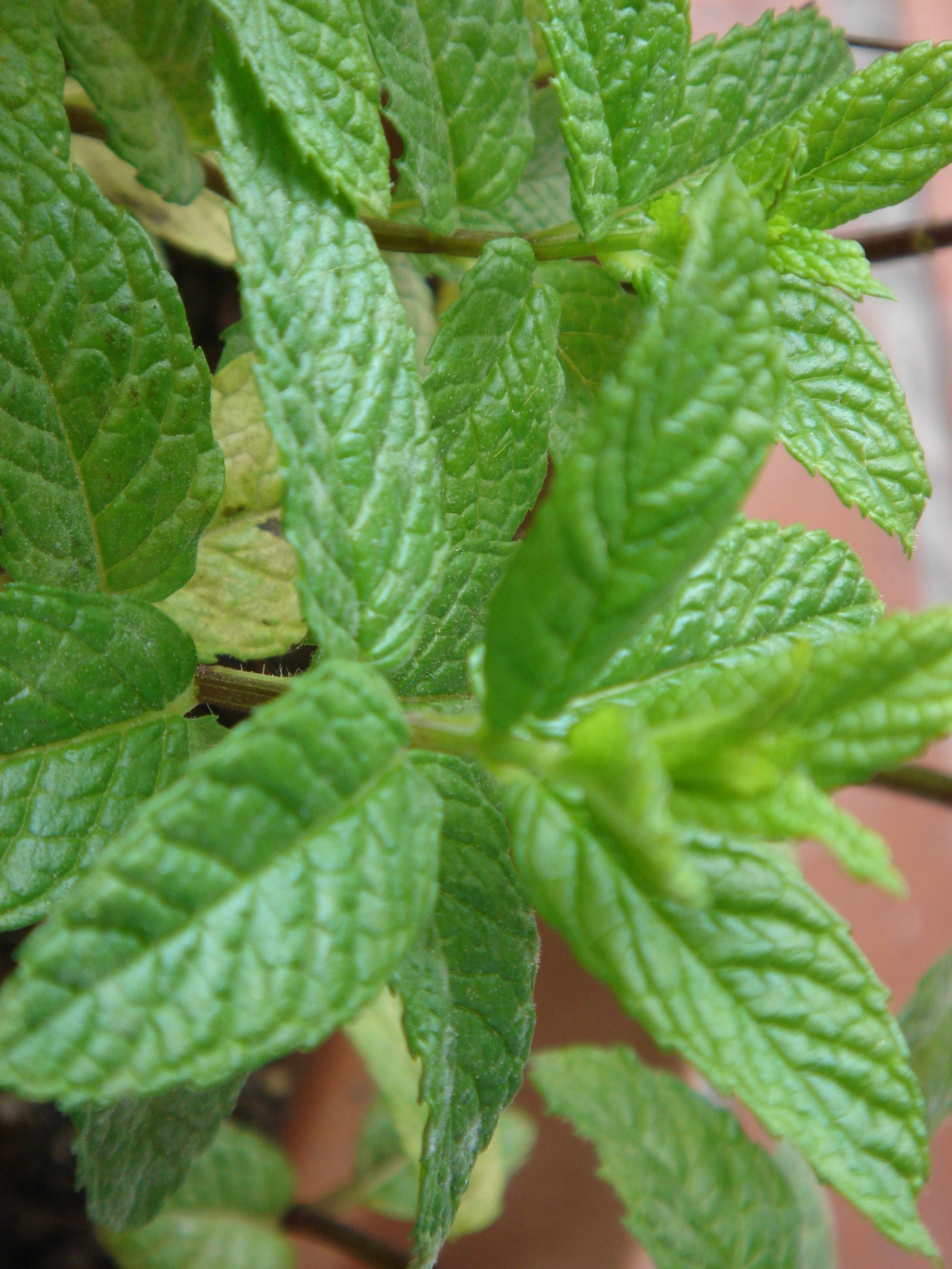 Menta